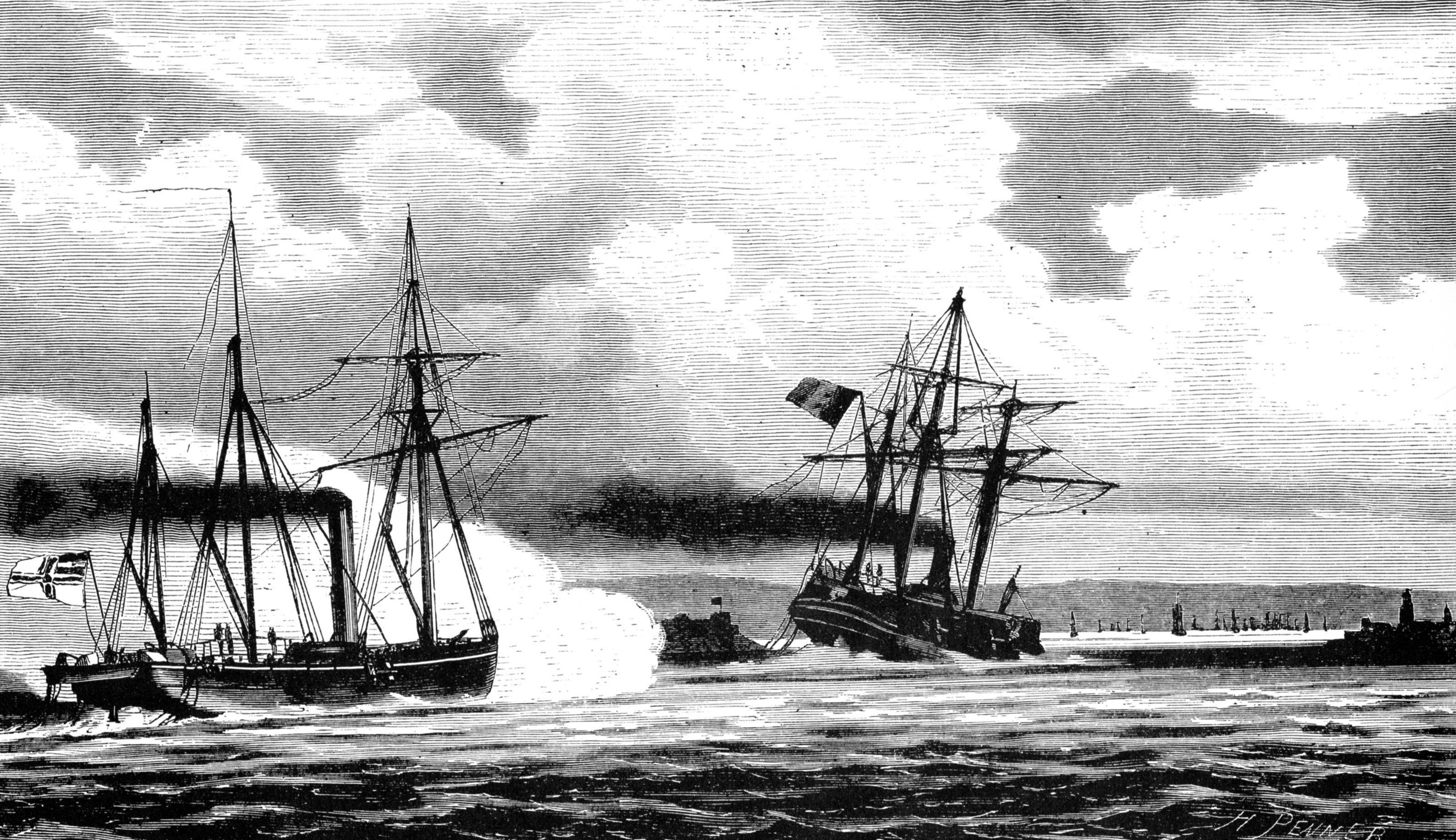 The naval battle off Havana on November 9, 1870. On the left, the north German gunboat SMS METEOR, on the right, the French Aviso BOUVET. Drawing by Hermann Penner (? -1894)